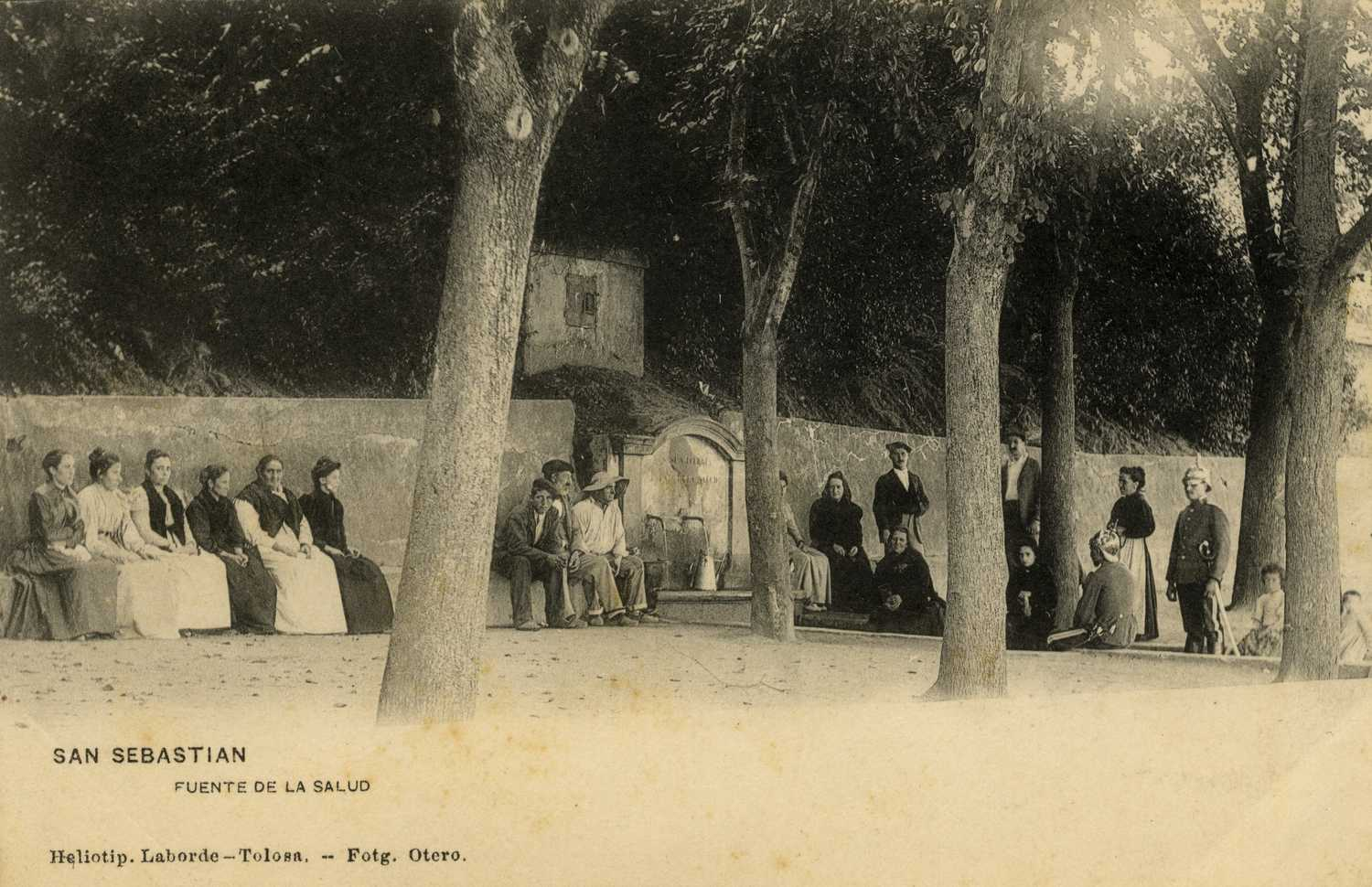 Garai bateko Amarako Osasun iturria